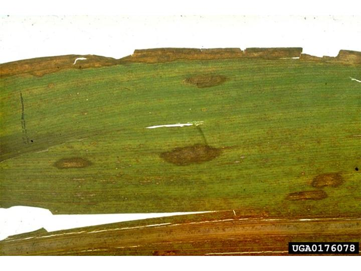 Bipolaris zeicola symptômes de l'helminthosporiose du maïs (Northern leaf spot of maize) sur feuille de maïs.